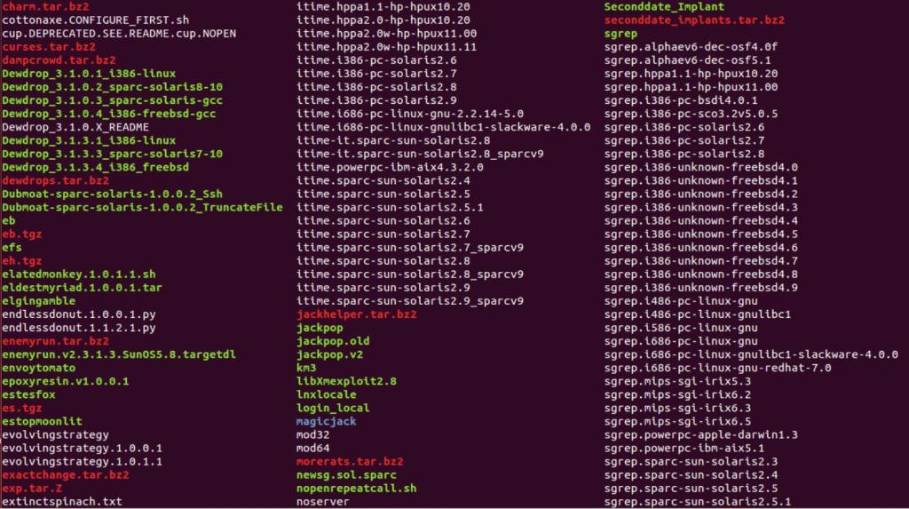 Украденные инструменты